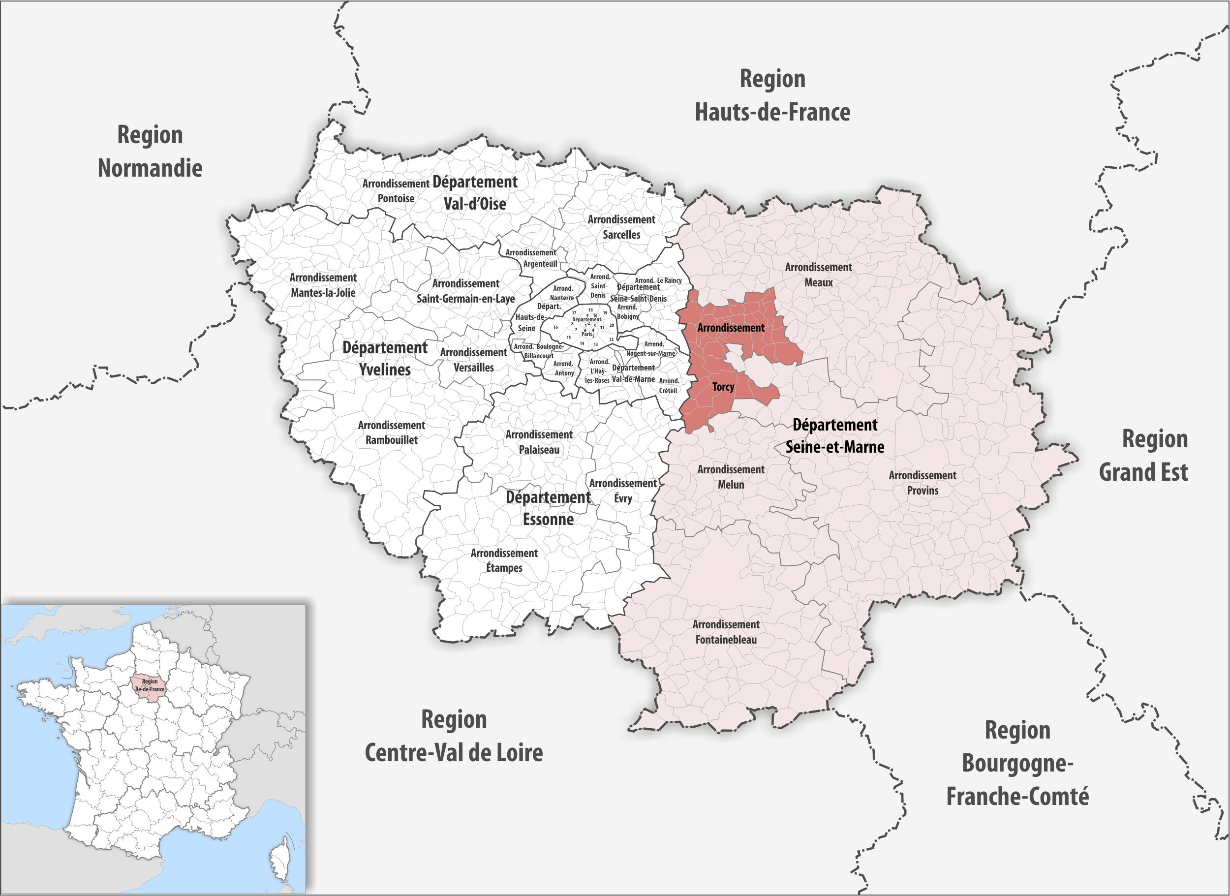 Lage des Arrondissements Torcy